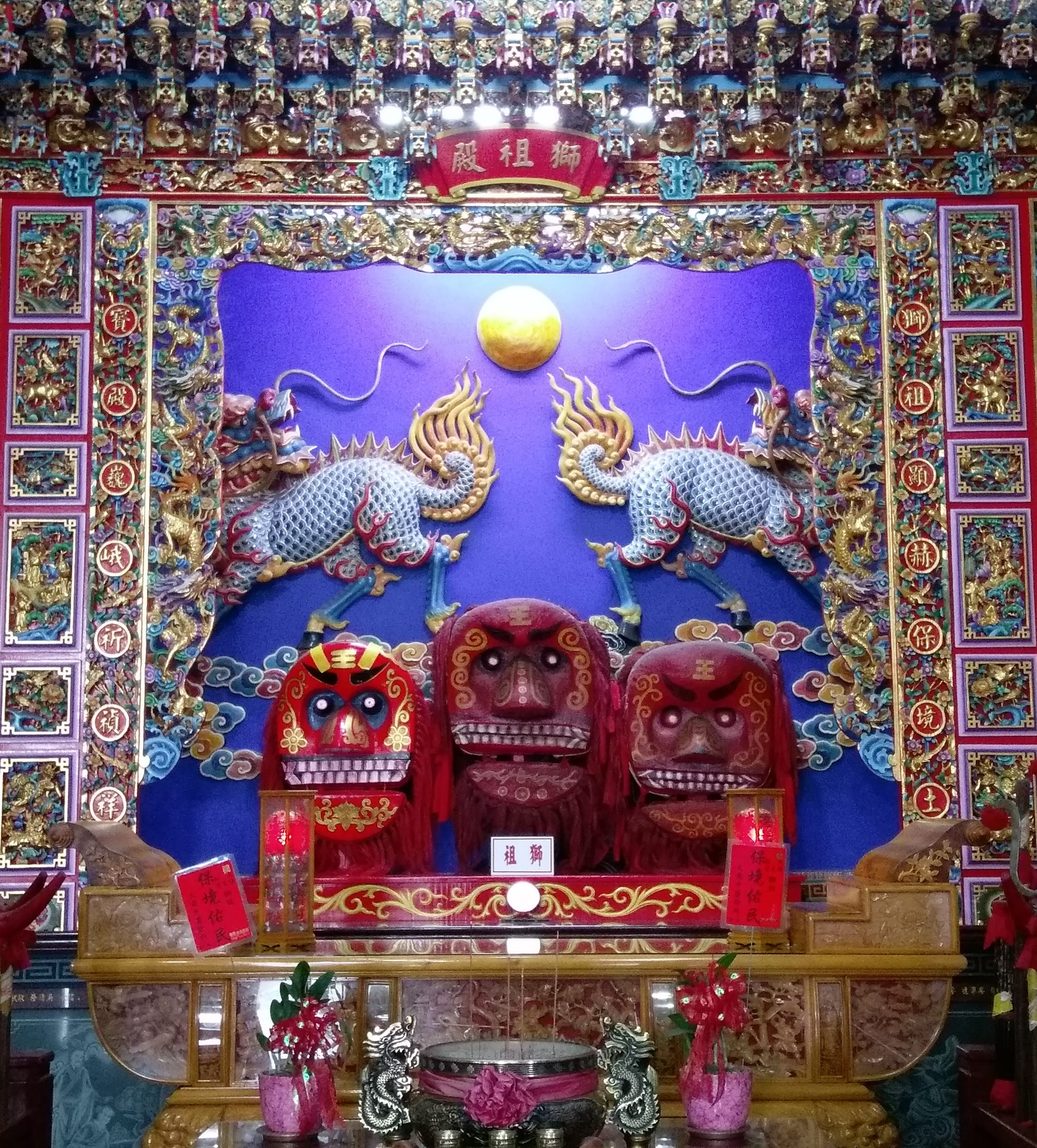 中文（台灣）: 大社保元宮獅祖